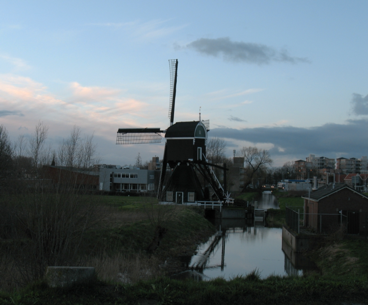 Wipmolen ter Leede te Leerdam, Zuid-Holland. Omgevingsfoto.